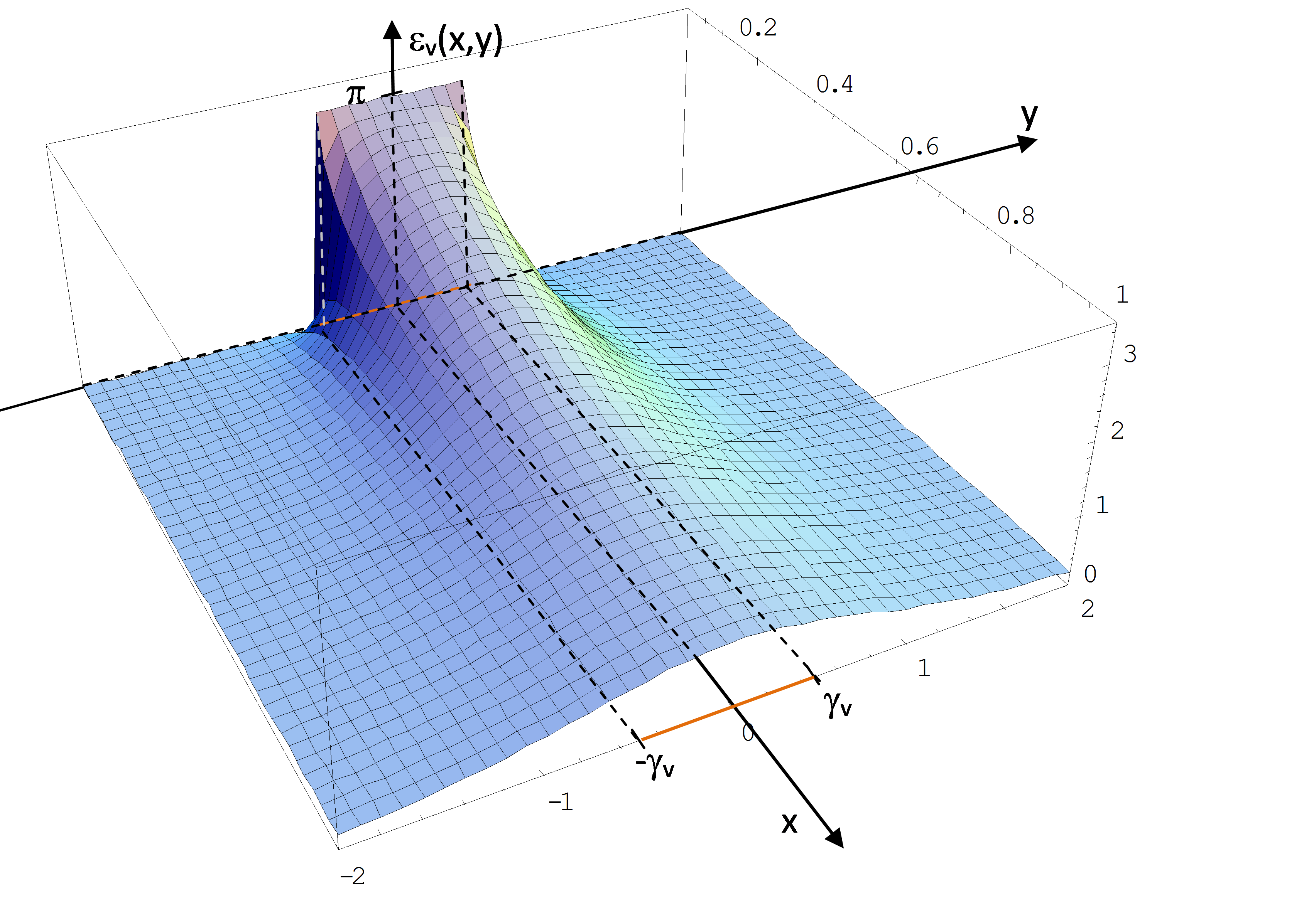 Graph des vertikalen Sehwinkels als Funktion von zwei Ebenenkoordinaten